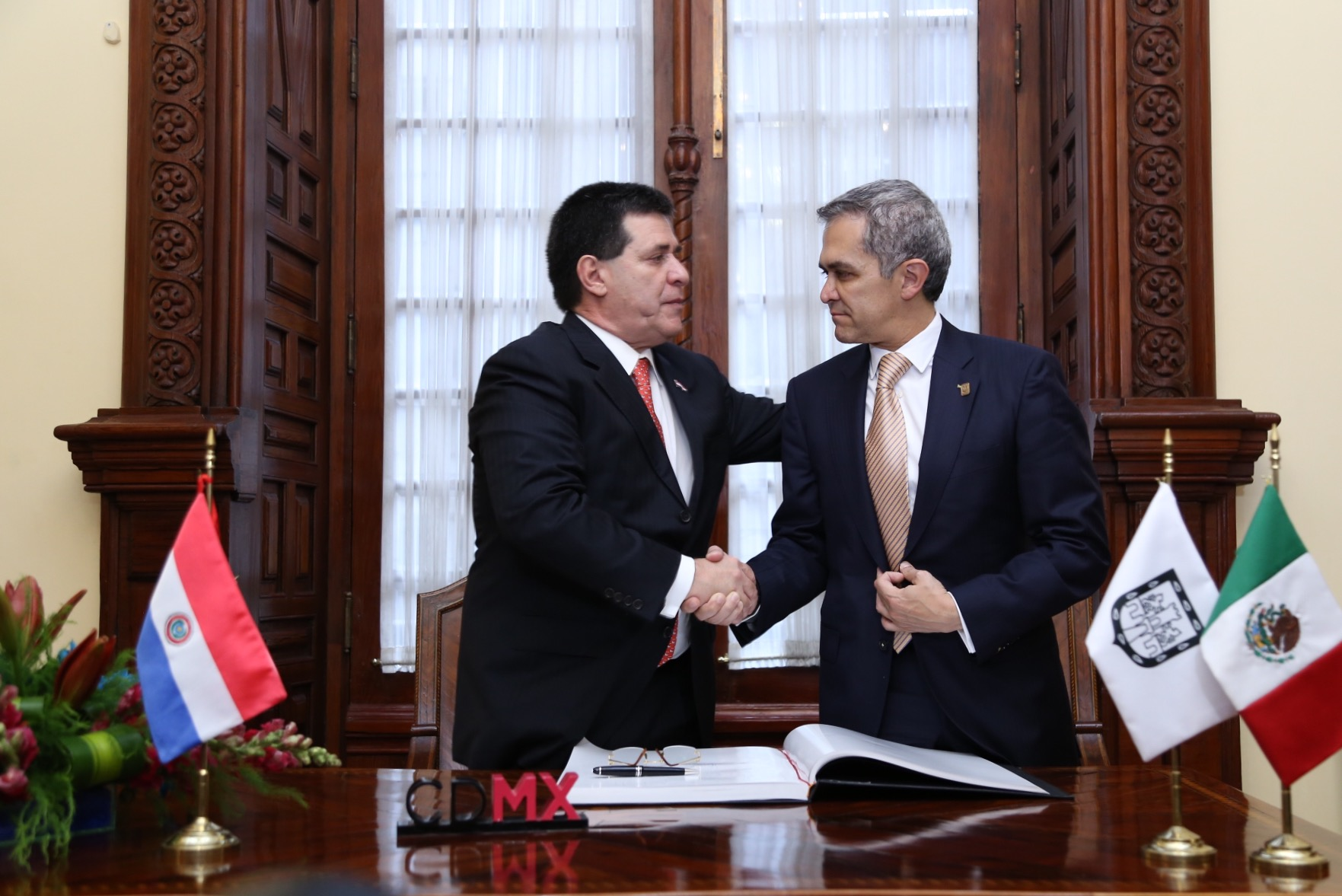 Ceremonia de Huésped Distinguido al Sr. Horacio Cartes Jara, Presidente de la República del Paraguay